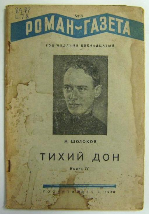 Журнал. Роман-газета: М.А. Шолохов. Тихий Дон. Книга IV. – Москва: Гослитиздат, 1938 – № 5